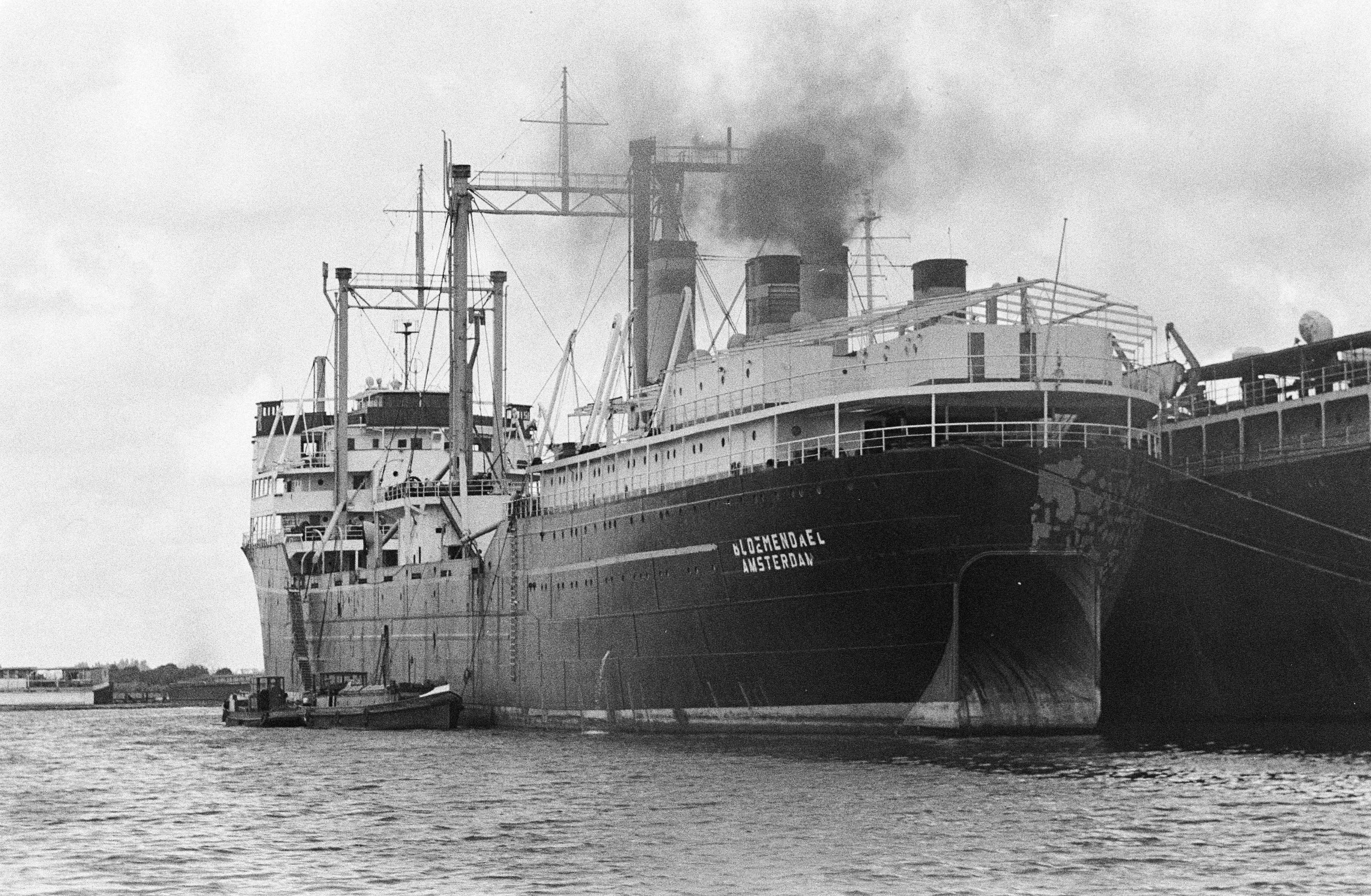 Collectie / Archief : Fotocollectie Anefo Reportage / Serie : [ onbekend ] Beschrijving : De Amsterdamse haven groeit Datum : 6 september 1960 Trefwoorden : HAVENS Fotograaf : Rossem, Wim van / Anefo Auteursrechthebbende : Nationaal Archief Materiaalsoort : Negatief (zwart/wit) Nummer archiefinventaris : bekijk toegang 2.24.01.05 Bestanddeelnummer : 911-5700